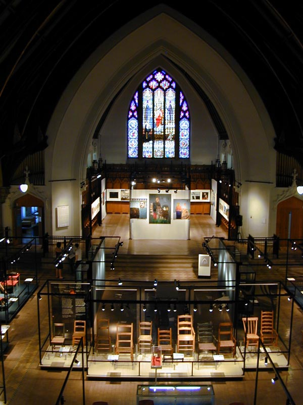 Vue générale de l'exposition permanente. L'espace central accueille des artisans qui viennent faire la démonstration de techniques artisanales.